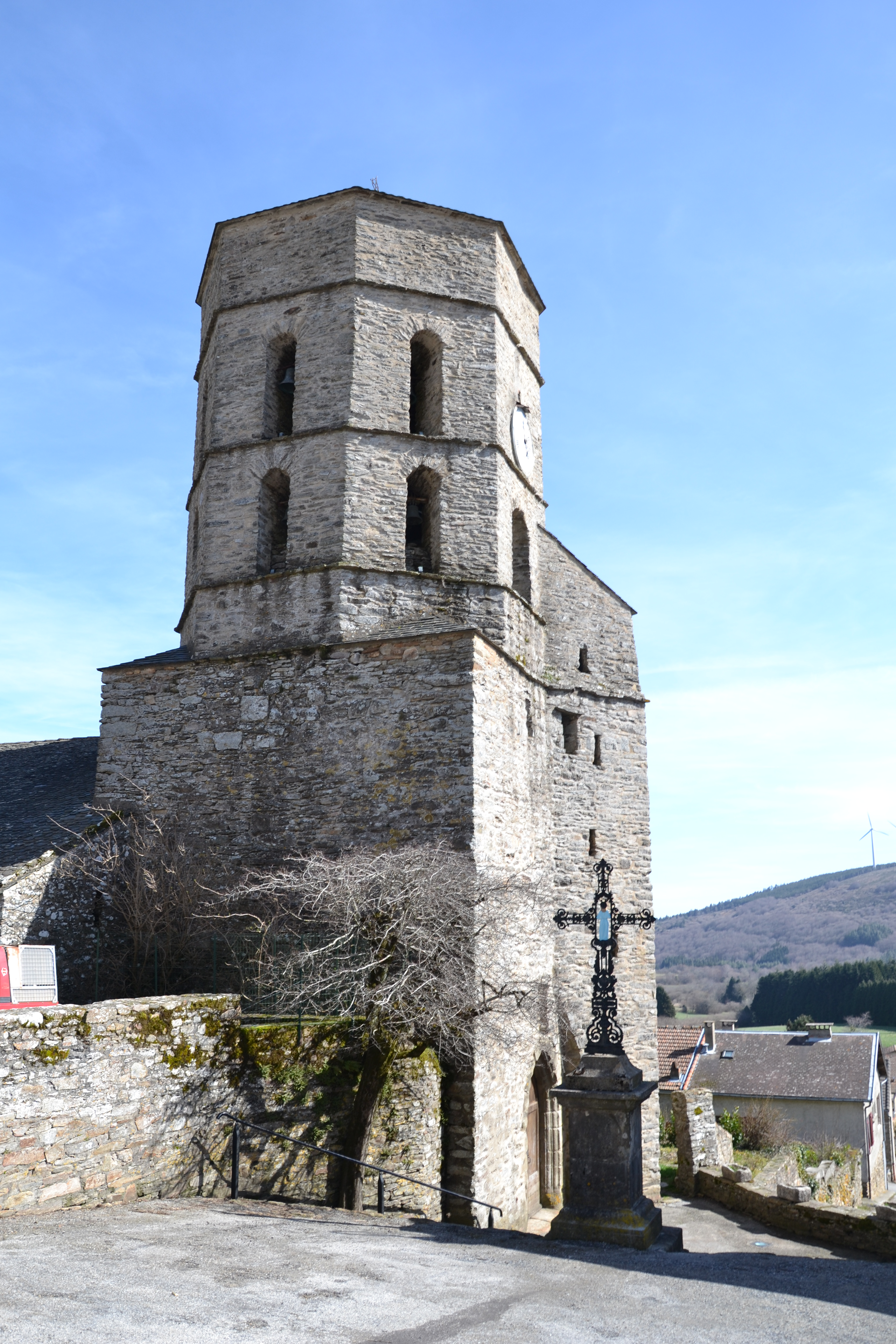 Eglise de Pradelles